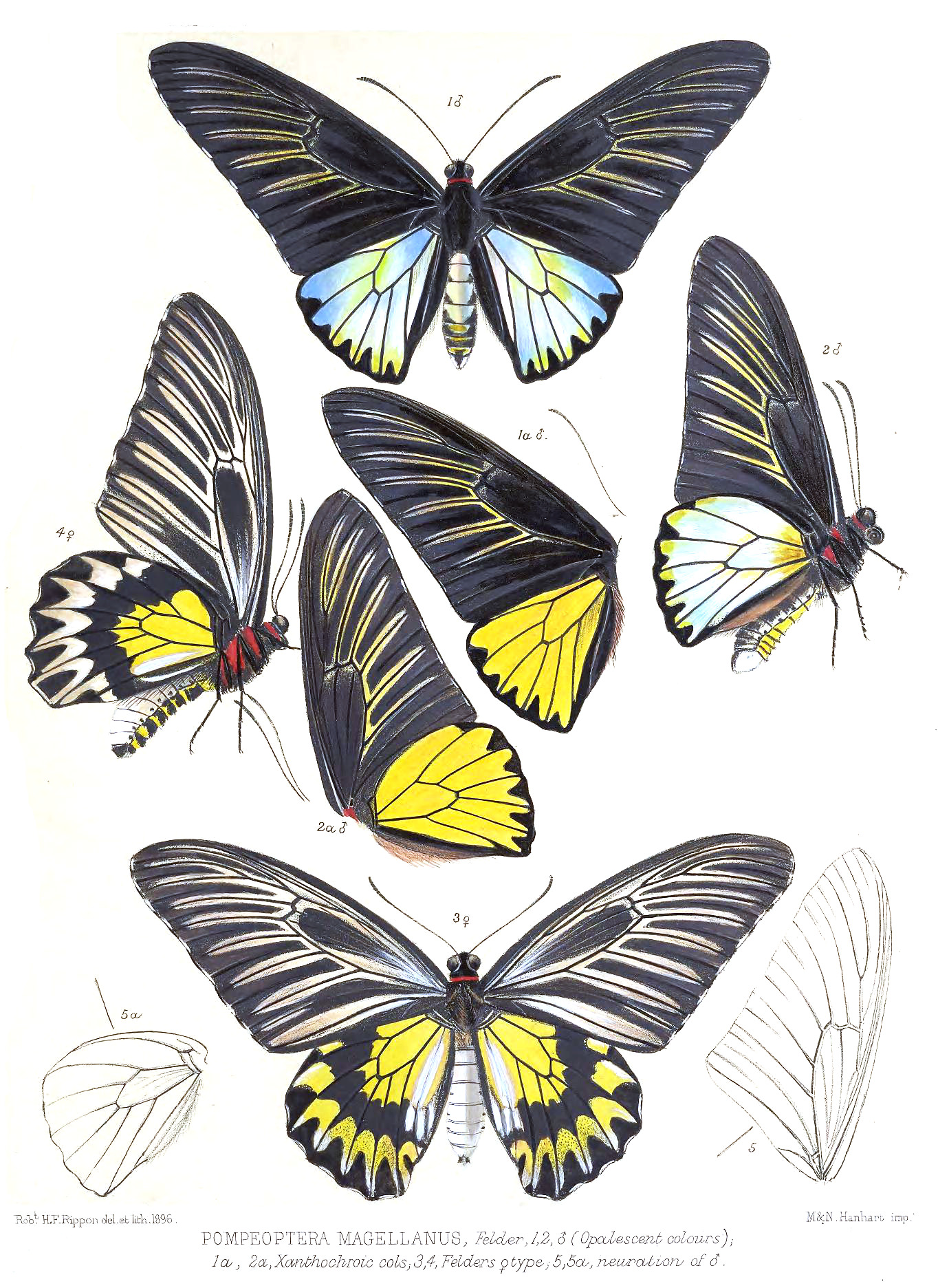 Pompeoptera magellanus